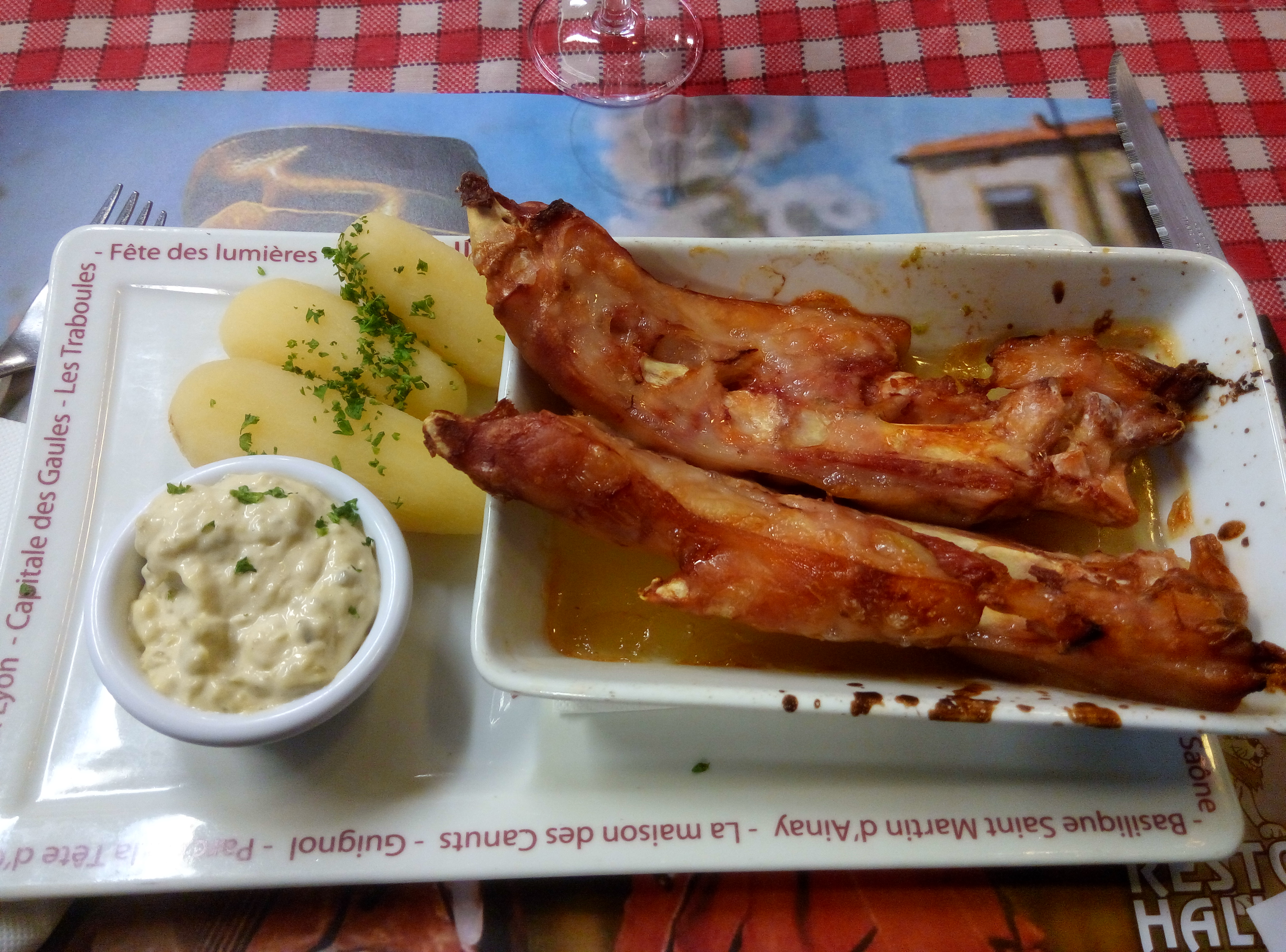 Des pieds de porc accompagnés de pommes de terre et de sauce tartare, servi au "Resto Halle" aux Halles de Lyon-Paul Bocuse, lors du repas consécutif à l'AG ordinaire de l'association Open Food Facts.